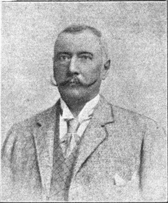 Österreichischer Politiker, Reichsratswahl 1907, Name siehe Dateiname